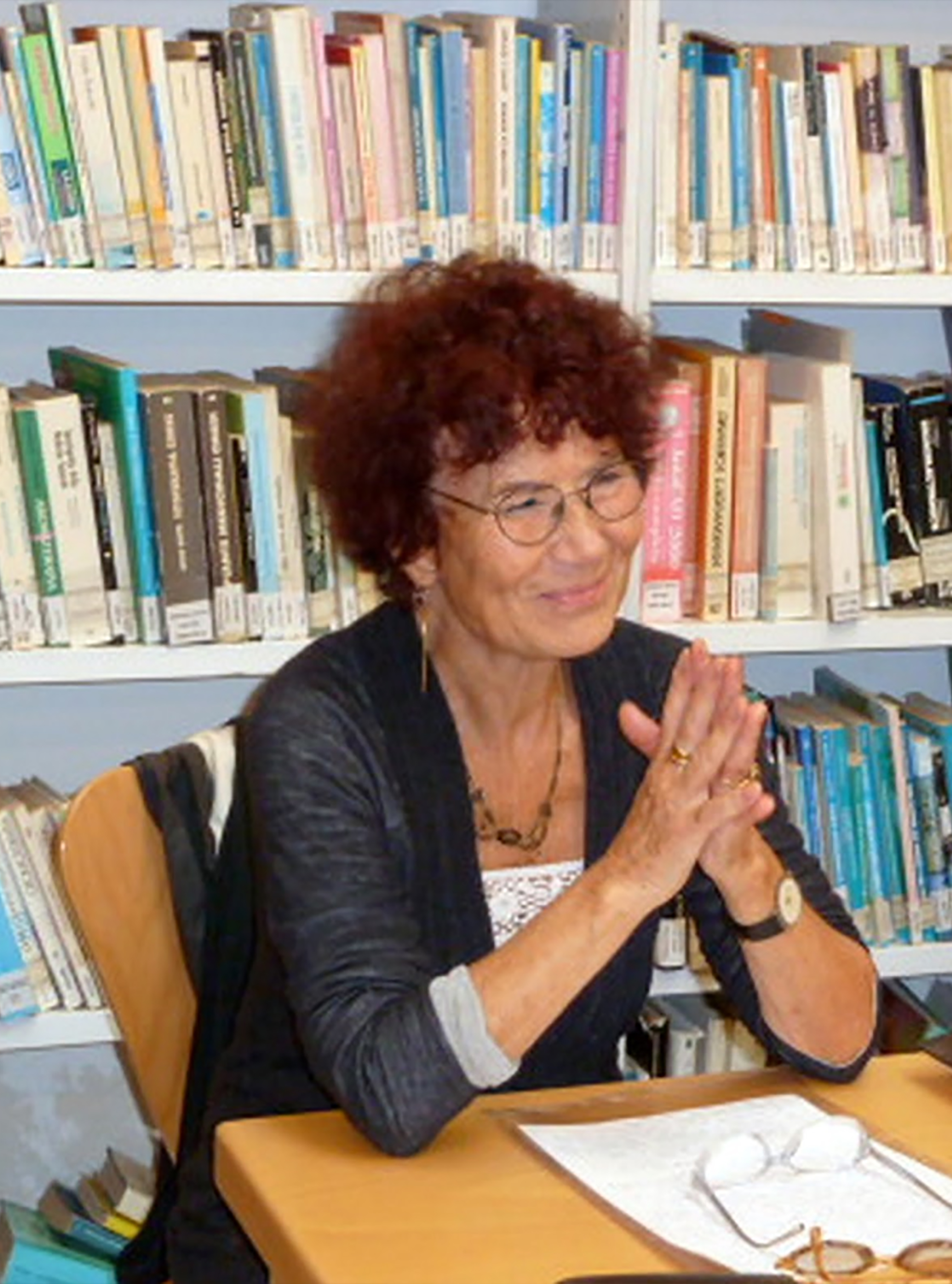 Isabella Vaj